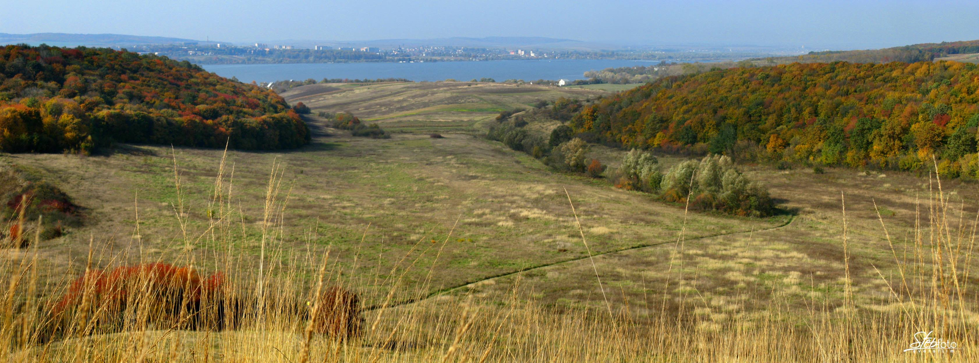 «Касова Гора», Галицький район, с. Бовшів